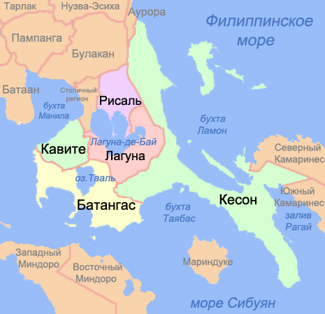 Карта провинций региона Калабарсон (Филиппины)